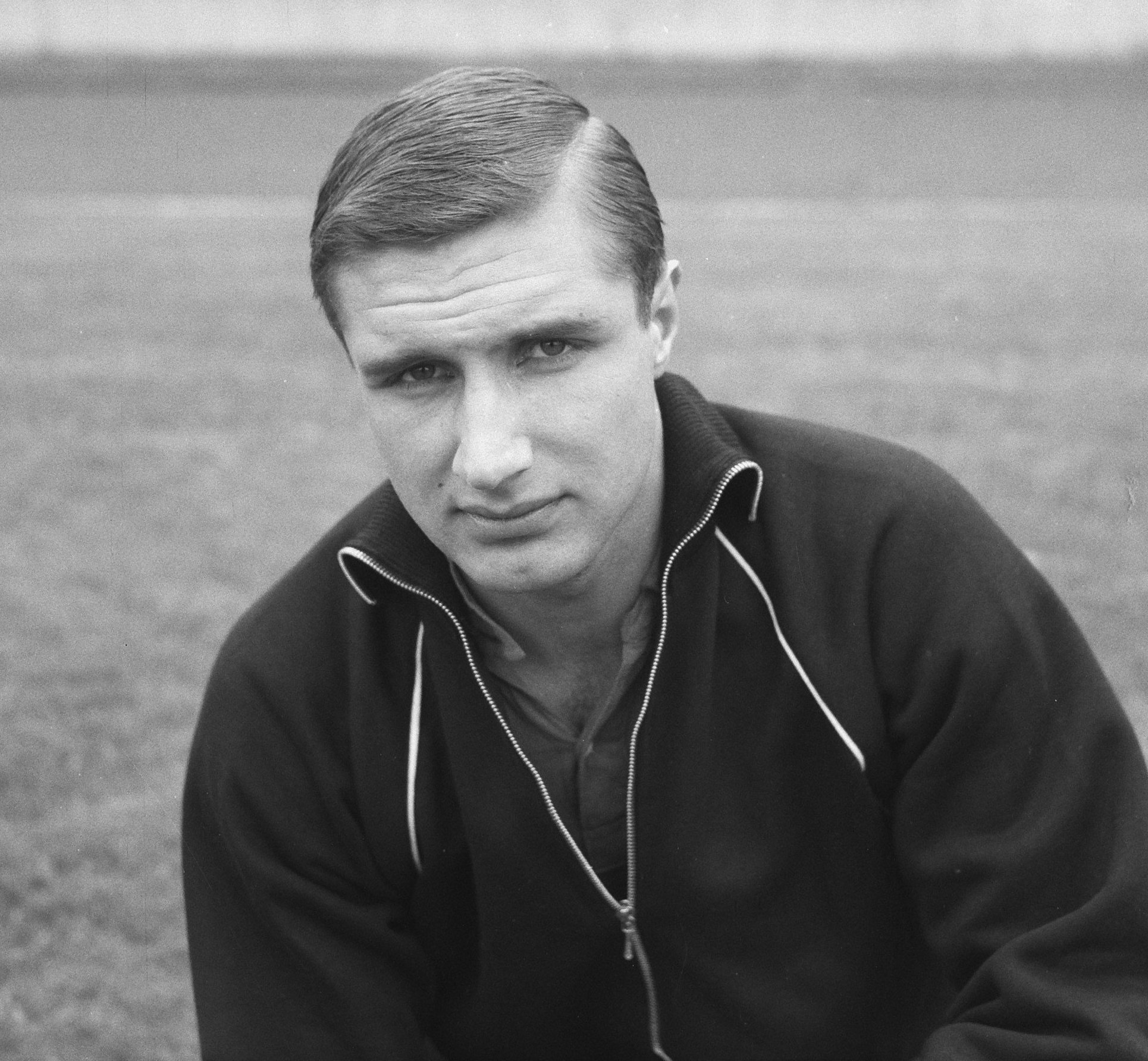 Collectie / Archief : Fotocollectie Anefo Reportage / Serie : [ onbekend ] Beschrijving : Voetbalkoppen Veldhoen (Feyenoord) Datum : 23 april 1961 Trefwoorden : Voetbalkoppen, sport Instellingsnaam : Feyenoord Fotograaf : Bilsen, Joop van / Anefo Auteursrechthebbende : Nationaal Archief Materiaalsoort : Negatief (zwart/wit) Nummer archiefinventaris : bekijk toegang 2.24.01.03 Bestanddeelnummer : 912-3919